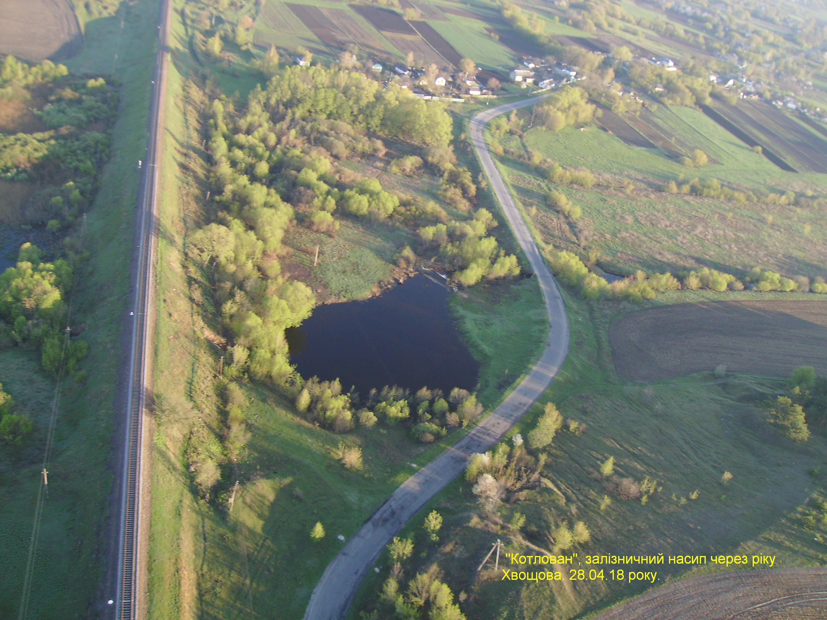 Насип залізниці через ріку Хвощова, народна назва - "Ко(а)тлаван